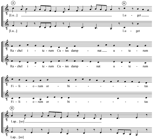 Транскрипция средневекового кондукта (начальные фразы)